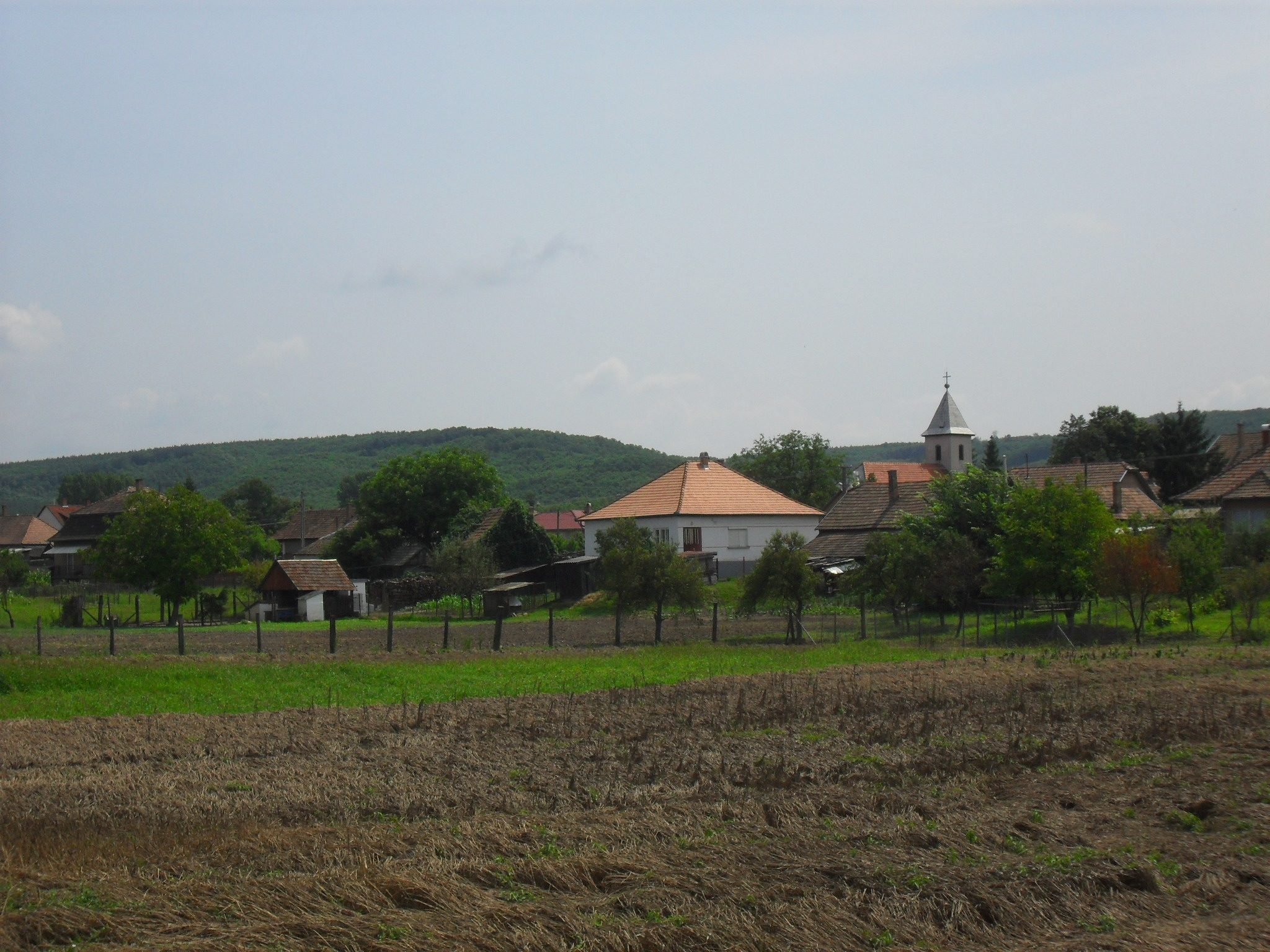 Ipolyszög